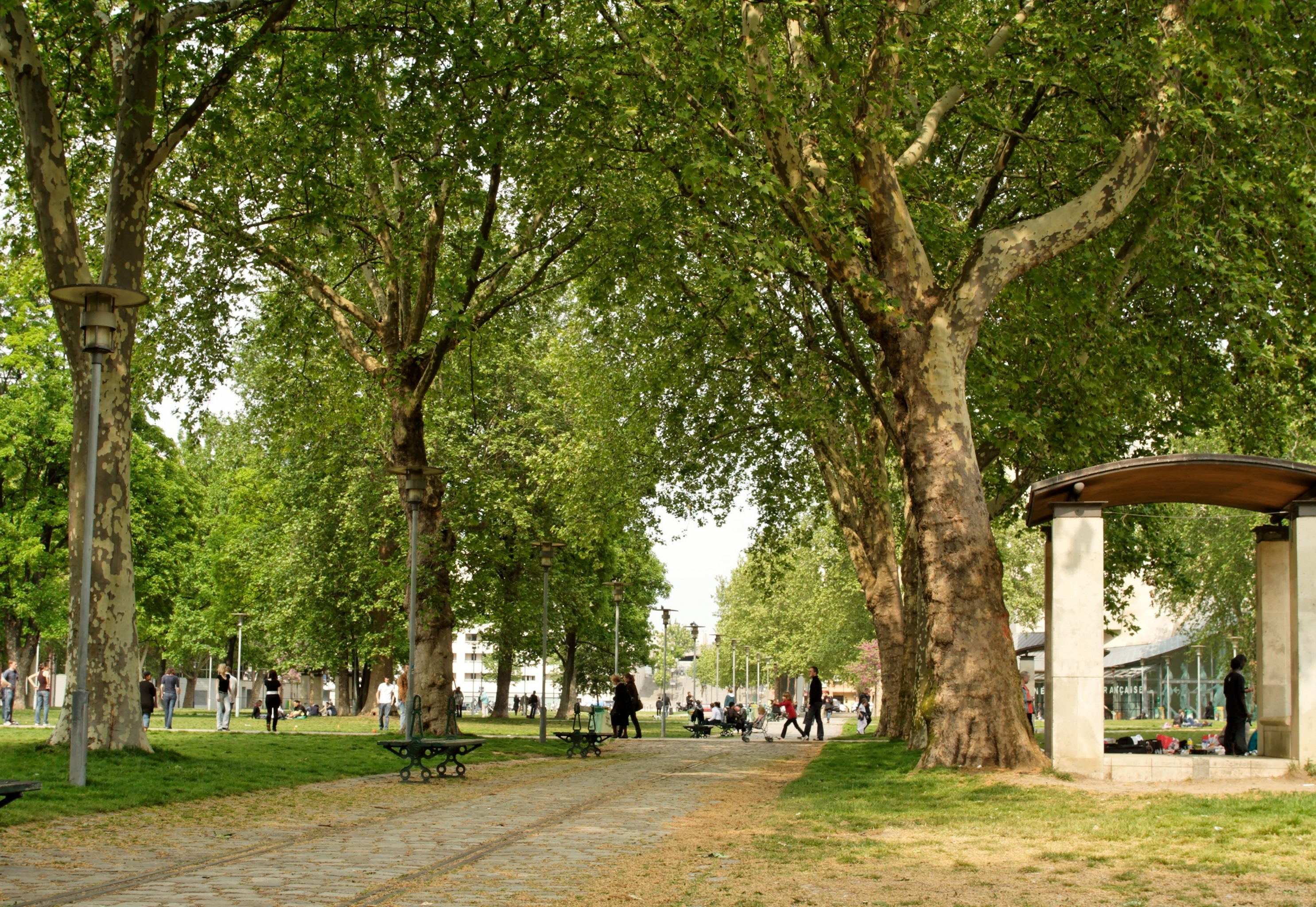 Les arbres centenaires du parc de Bercy à Paris